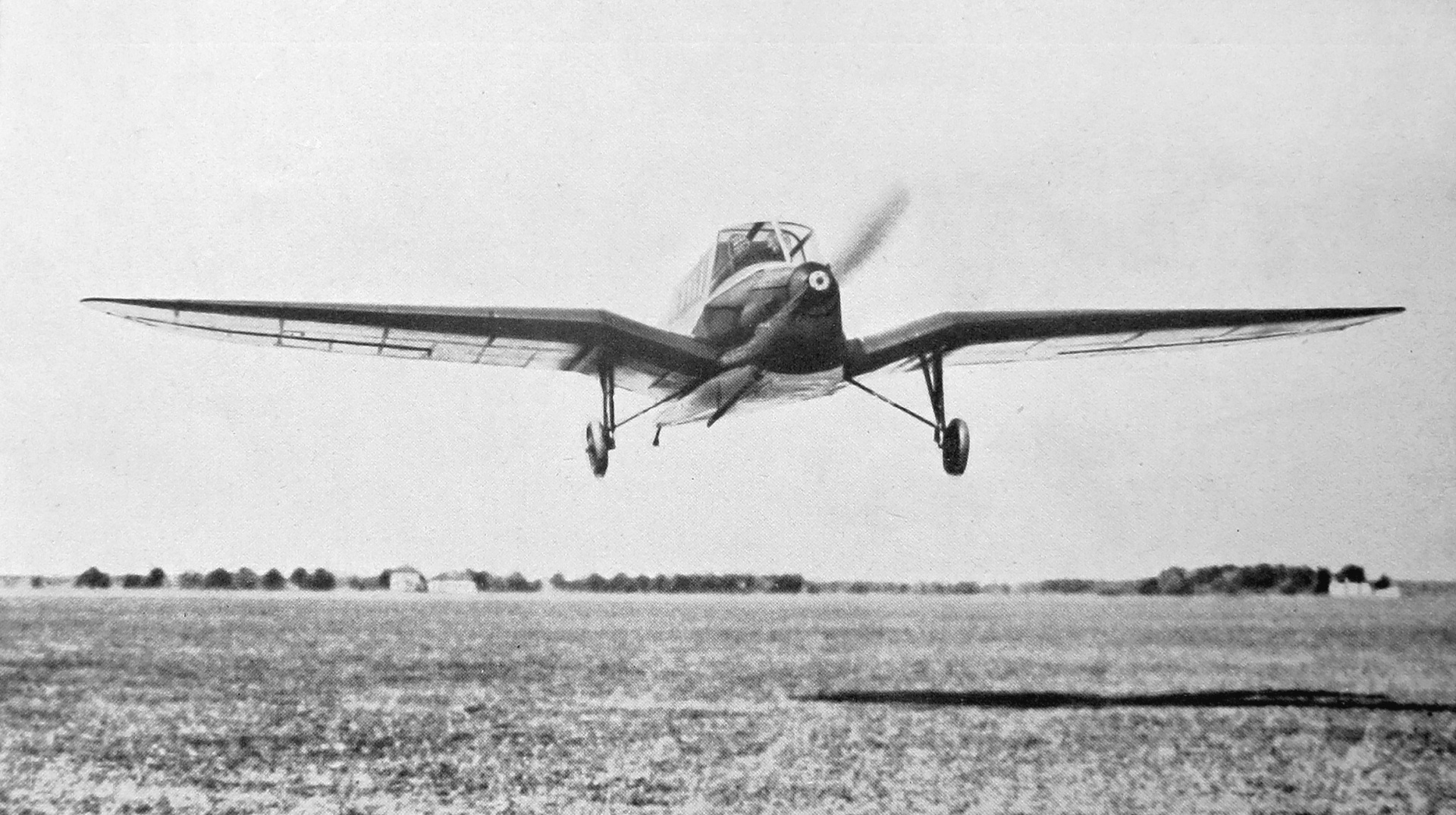 Walter Mikron a Koolhoven F.K.53 Junior (1936)